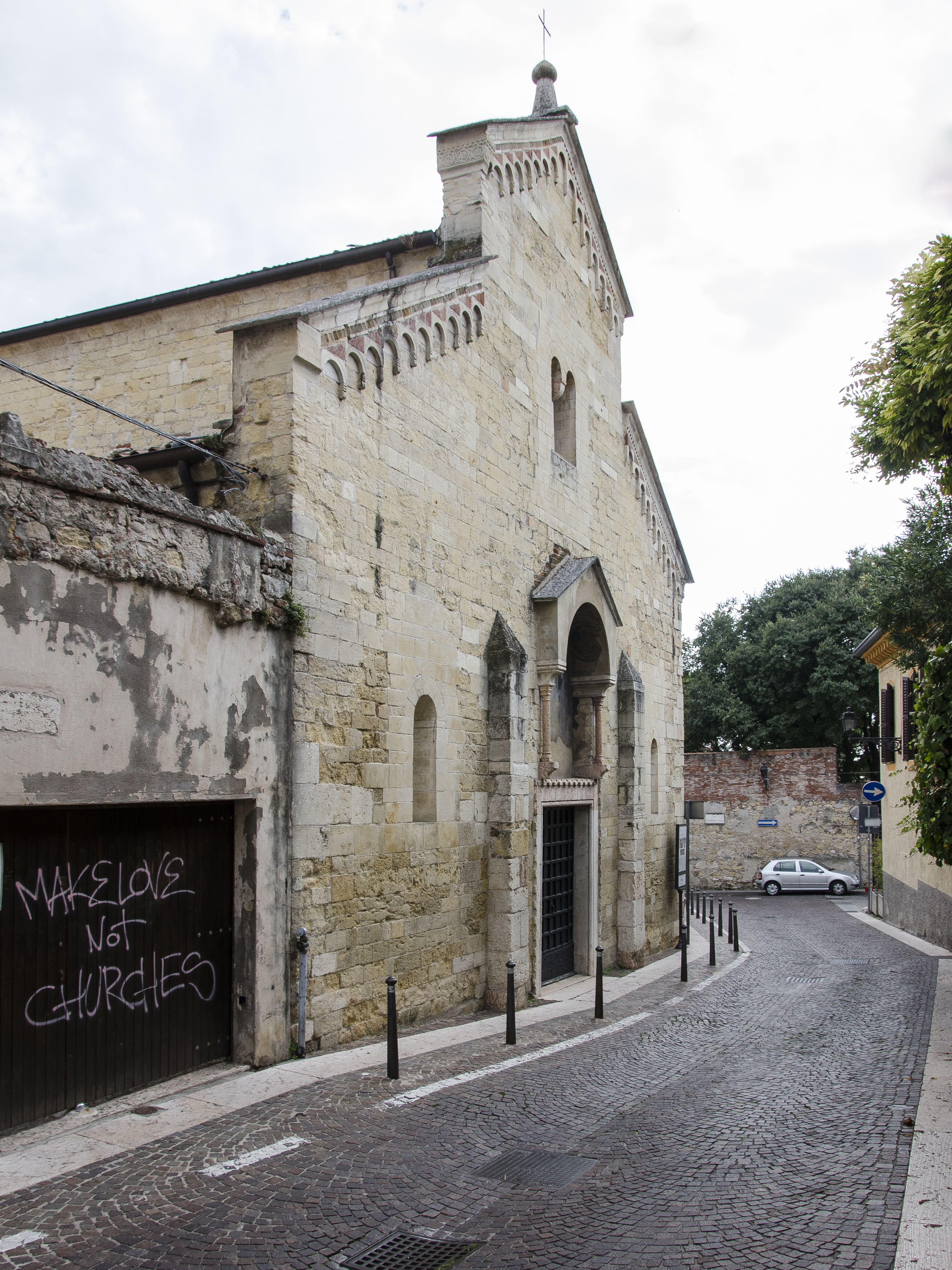 Facciata principale